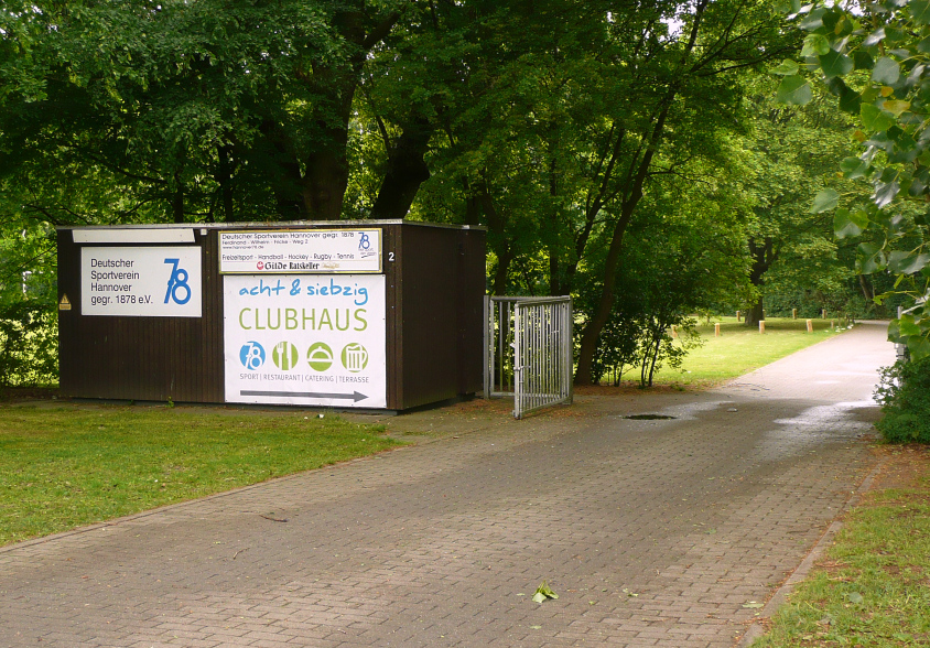 Eingangstor Hannover 78